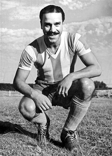 José Manuel Moreno con la Seleción Argentina de Fútbol